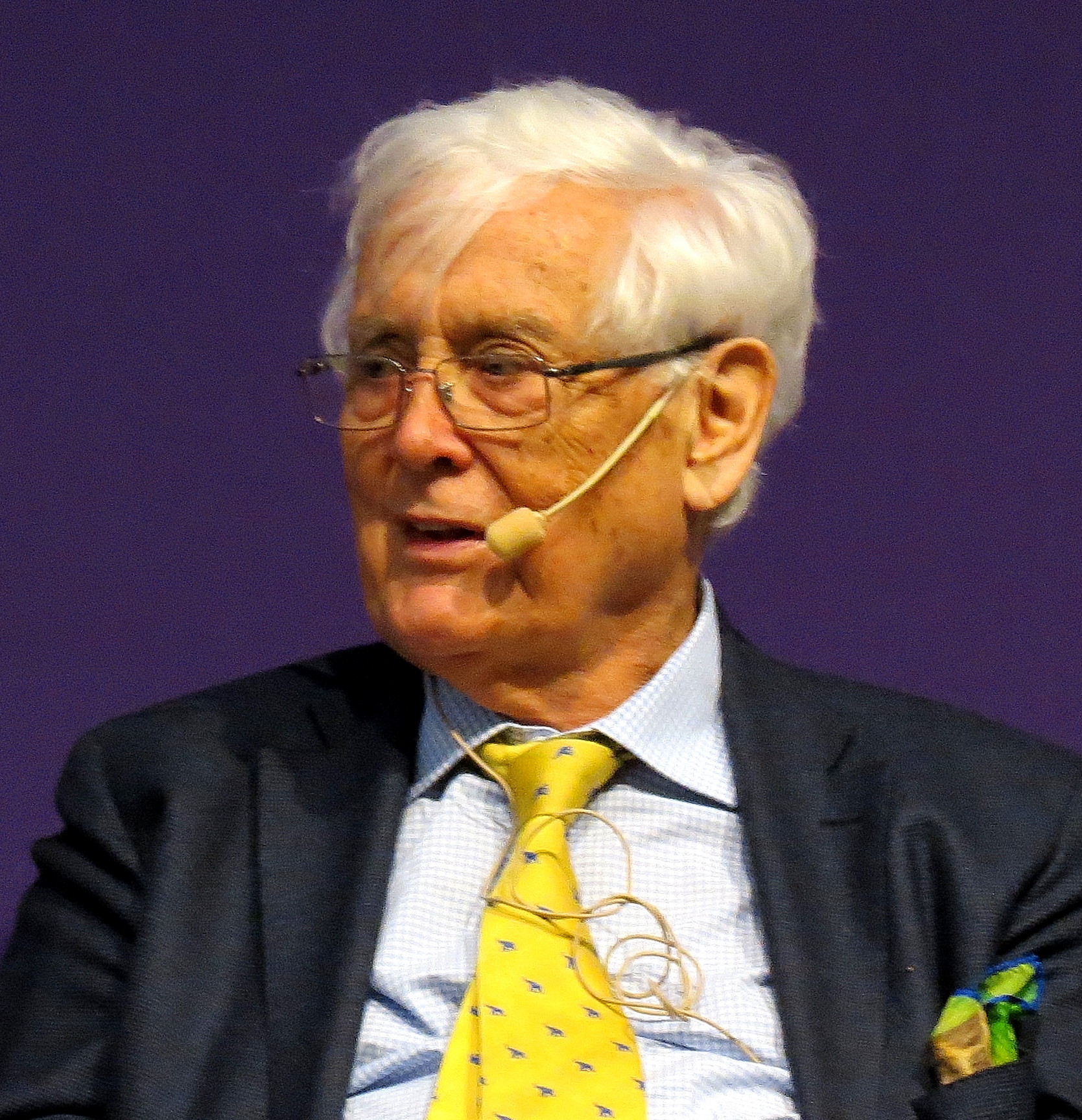 Jan Mårtenson på bokmässan i oktober 2017.